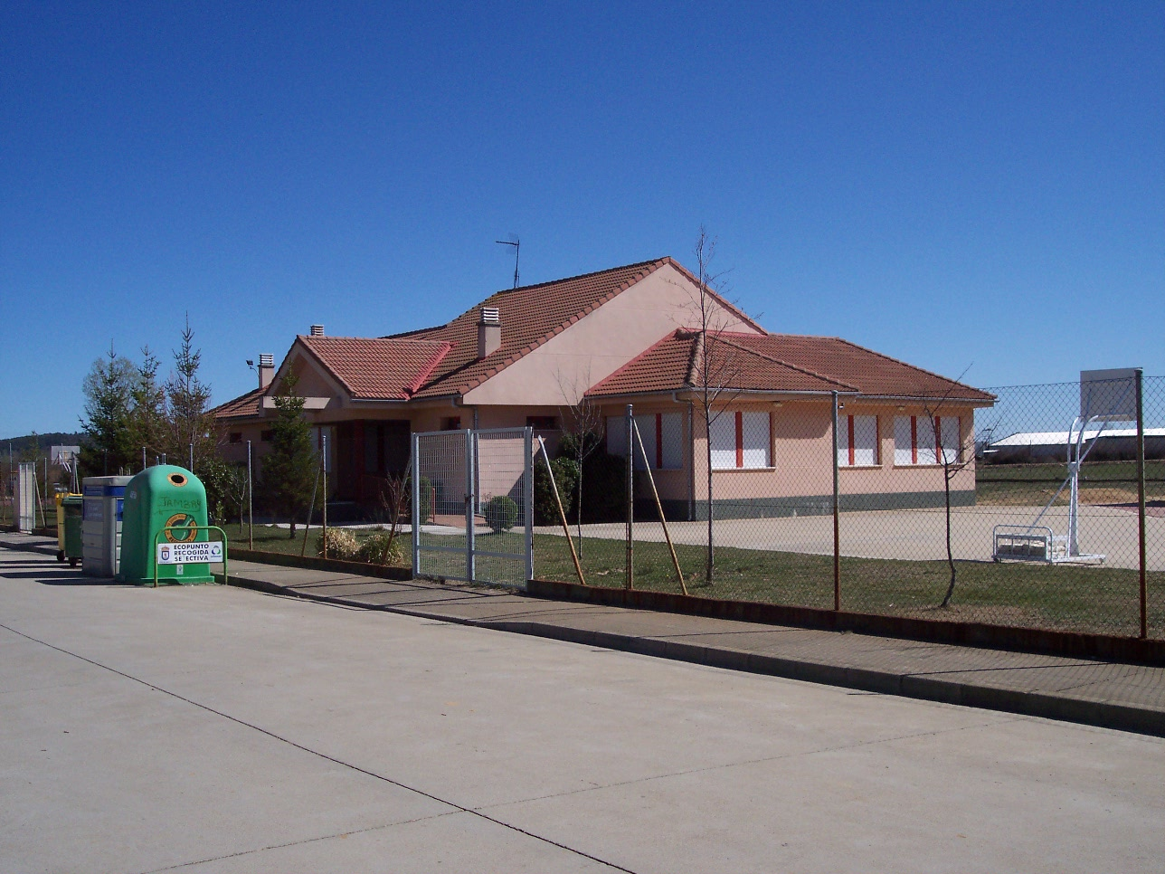 Vista del colegio rural de la localidad de Sariegos (León)